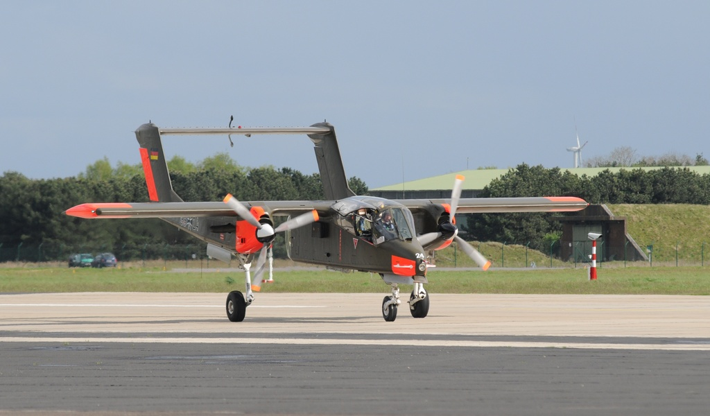 Rockwell OV-10B "Bronco" der deutschen Luftwaffe